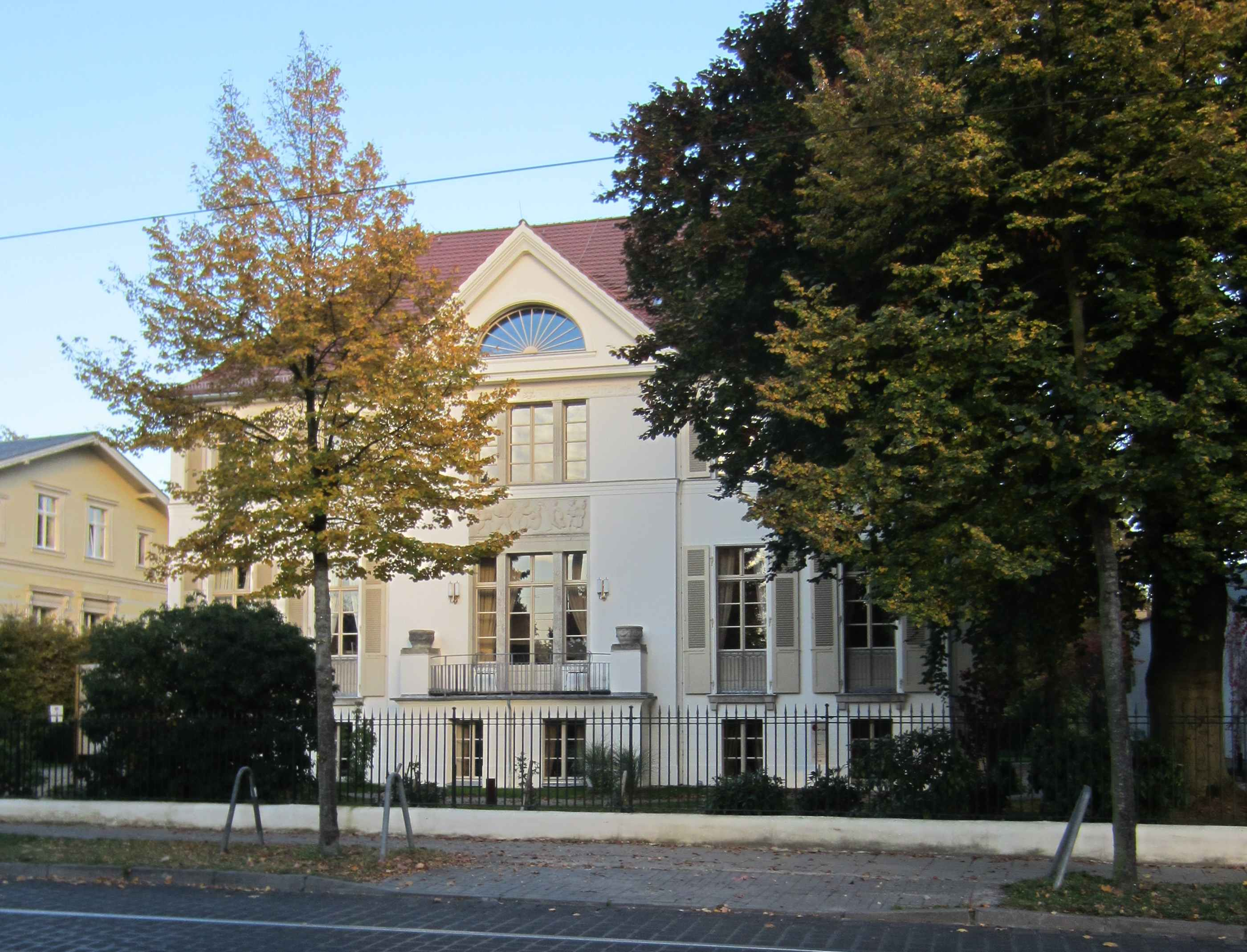 Denkmalgeschützte Villa in Potsdam, Puschkinallee 12, 1909/10, Architekt Paul Otto August Baumgarten